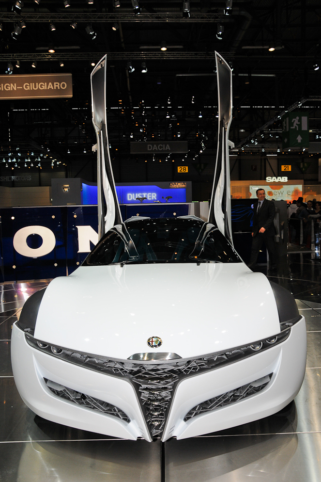 Autosalon Genf 2010